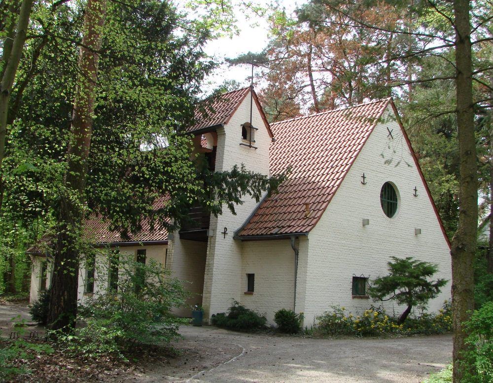 Die Kirche in Wilhelmshorst, Gemeinde Michendorf steht unter Denkmalschutz.